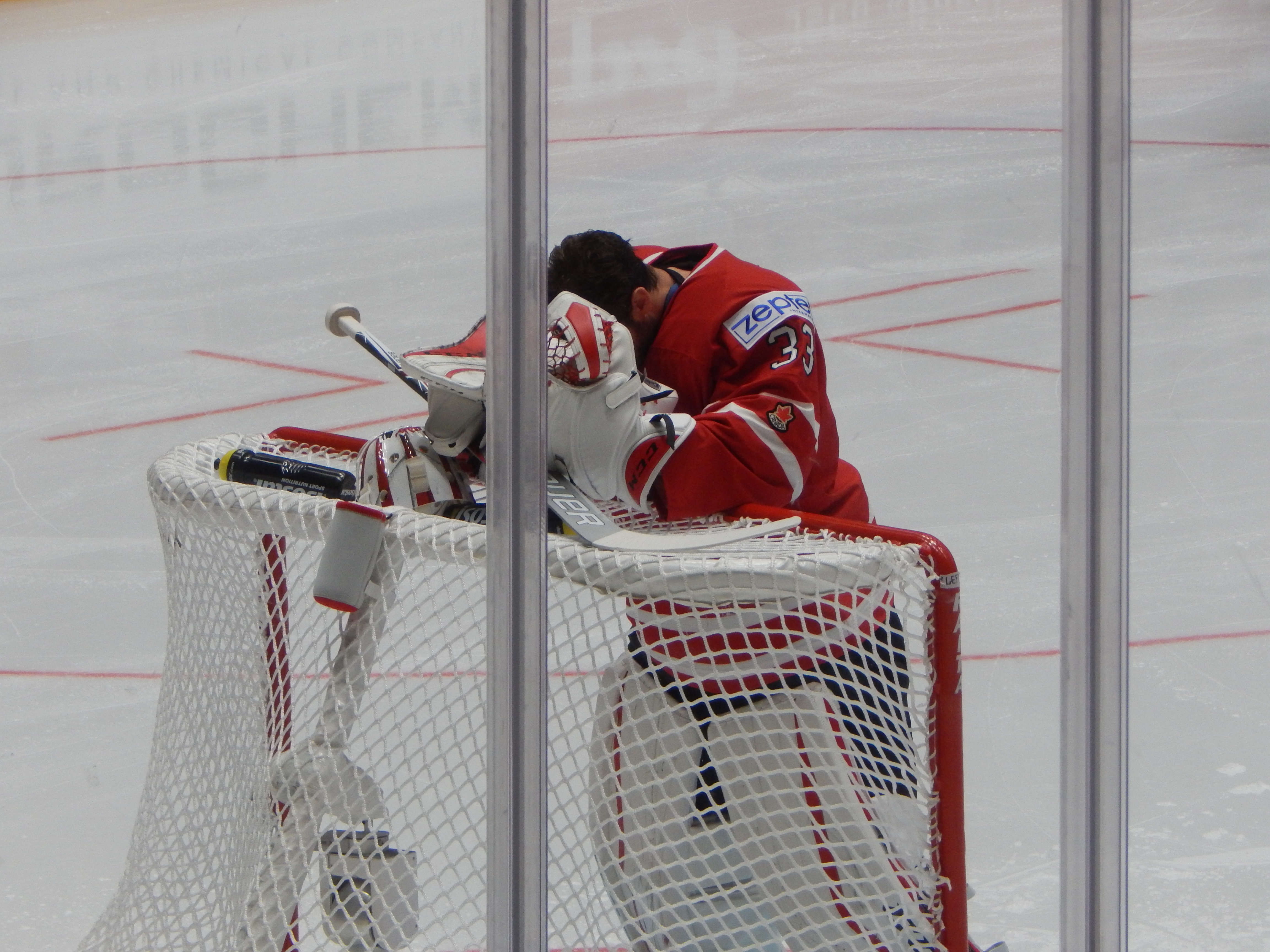 Кэм Тальбо перед матчем-открытия ЧМ 2016 против сборной США